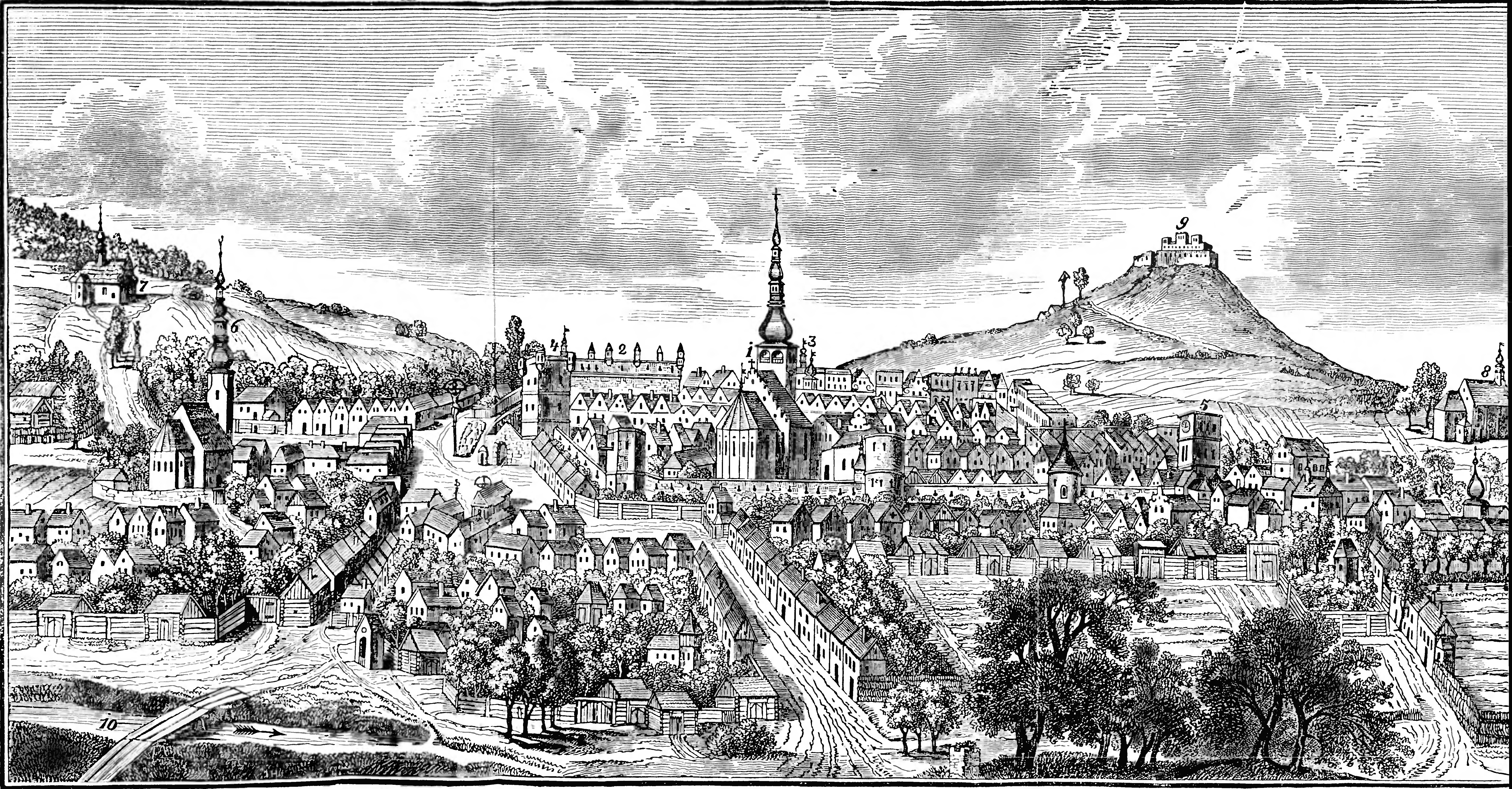 Obrázek na straně 240a z knihy Geschichte der Stadt Neutitschein (Nowý Jičín) und deren Umgebung. Původní popisek: »Neutitschein im Jahre 1722. 1. Unser Lieben Pfarrkirche, 2. Das Schloss, 3. Das Rathhaus, 4. Das Oberthor, 5. Das Niederthor, 6. Die allerheil. Dreifaltigkeitskirche, 7. Die Spanishe Capelle, 8. Das heil. Francisci Xav. Kirche, 9. Das Alt-Titscheiner Schloss, 10. Der Titsch-Fl??«